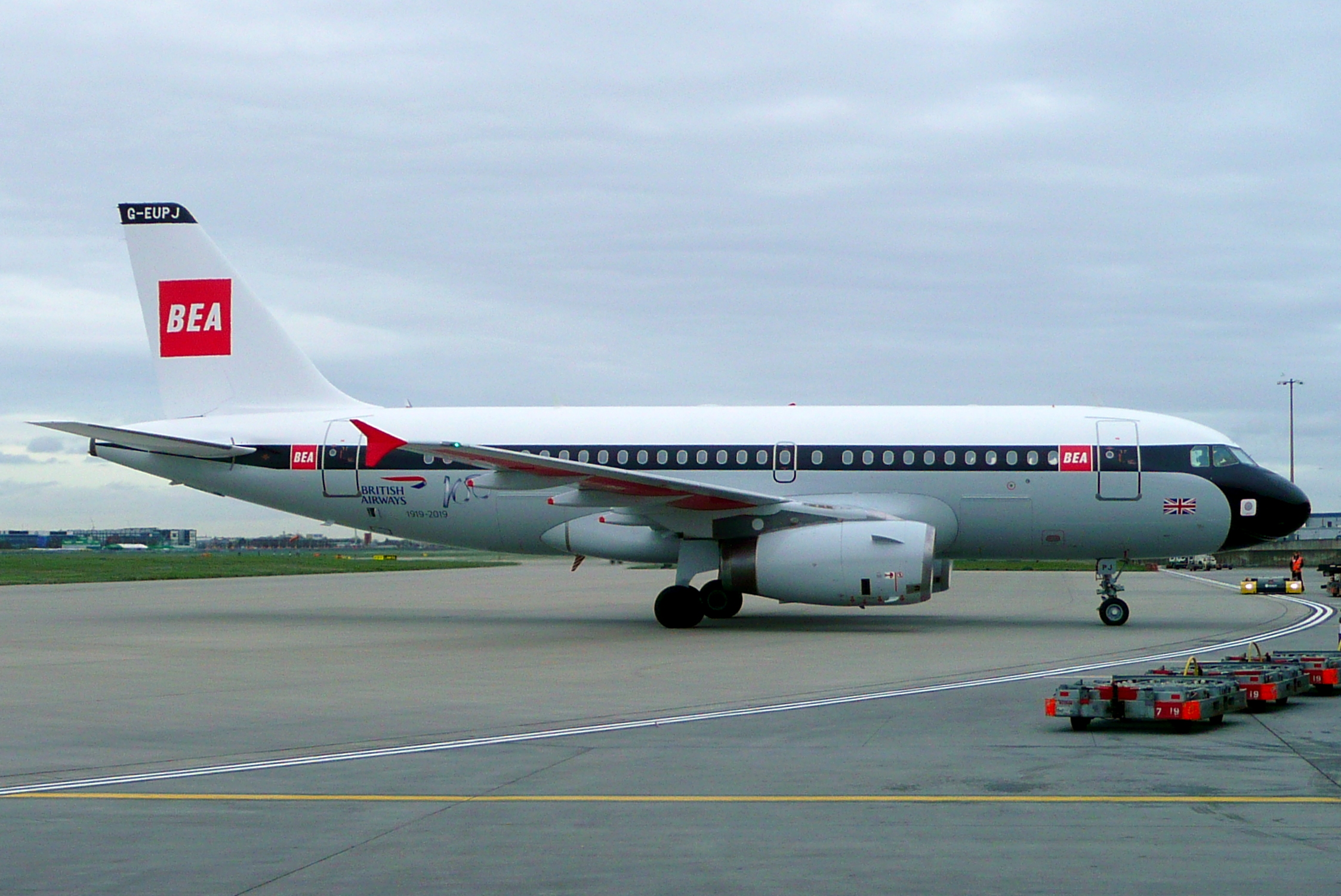 G-EUPJ 05032019LHR